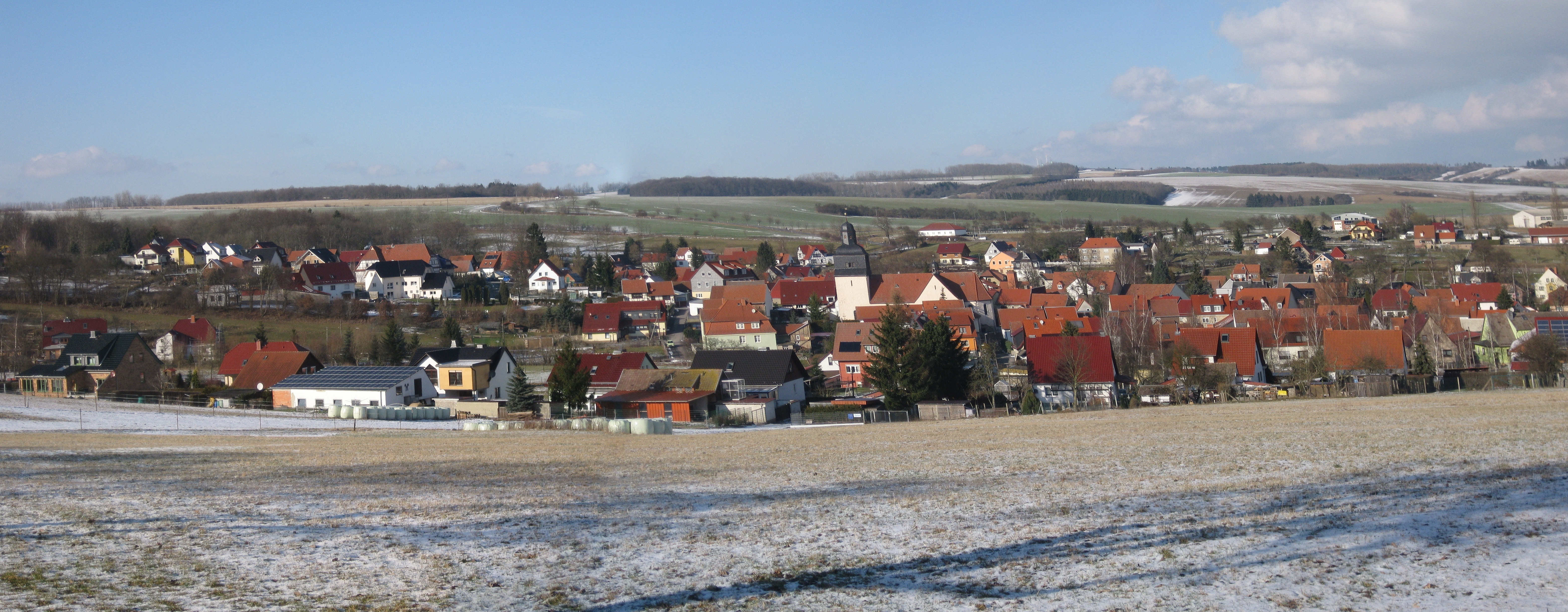 Kefferhausen im Eichsfeld (im Hintergrund rechts der Dün)